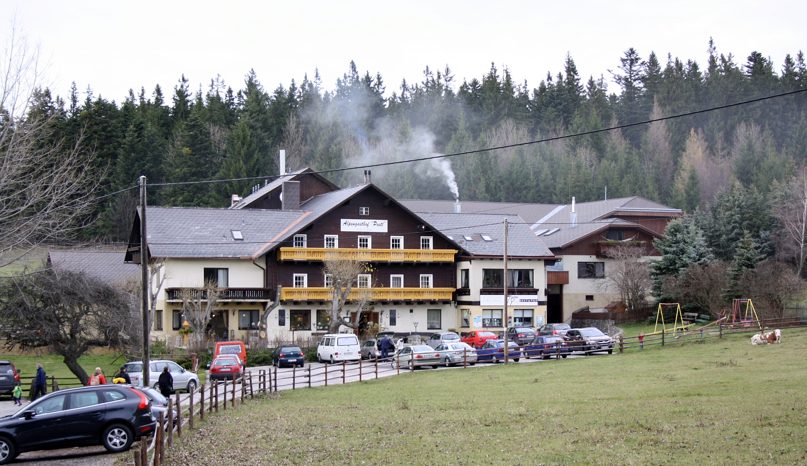 Der Alpengasthof Postl auf der Hohen Wand in Niederösterreich.